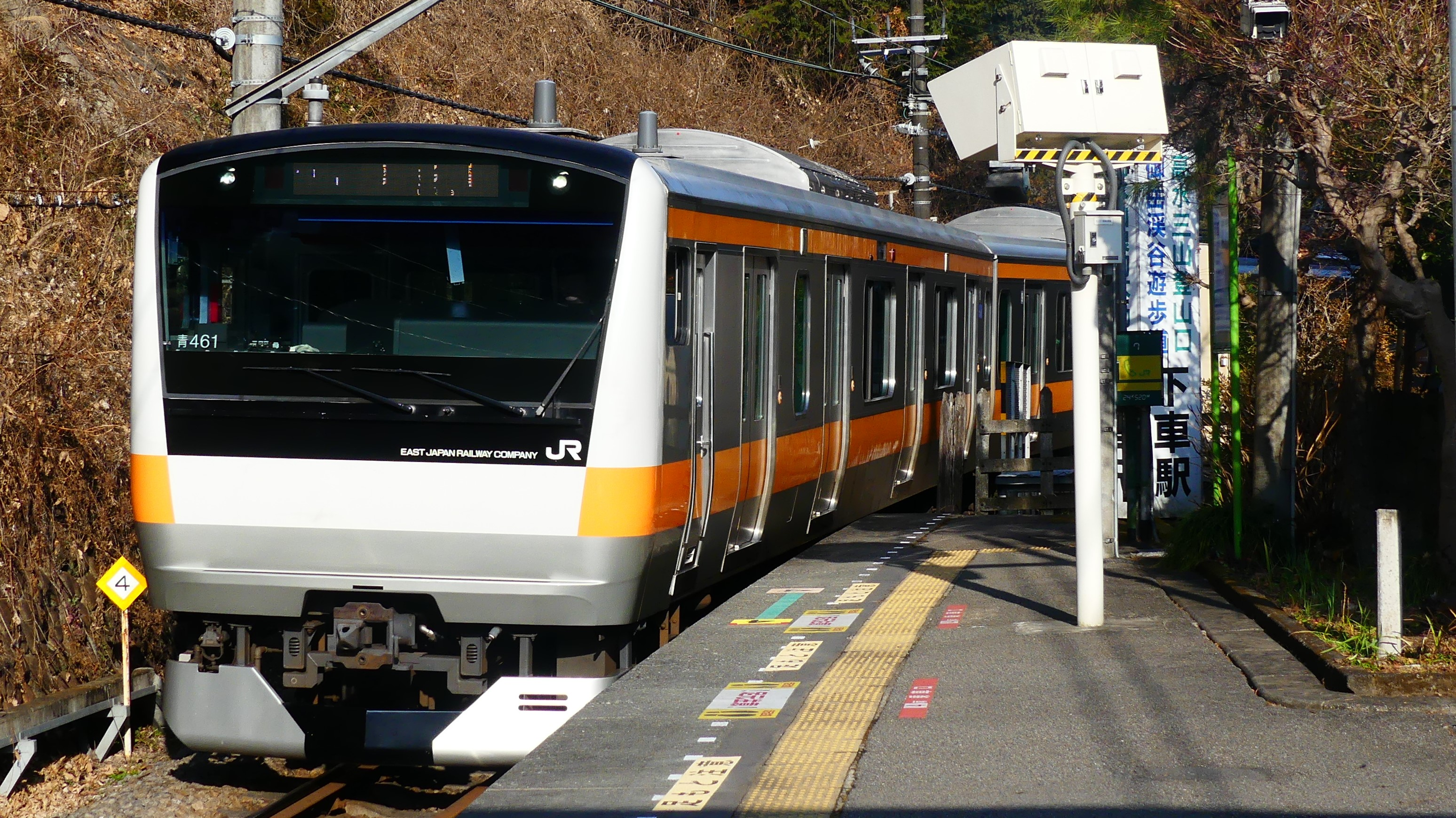 軍畑駅に入線する青梅線E233系0番台